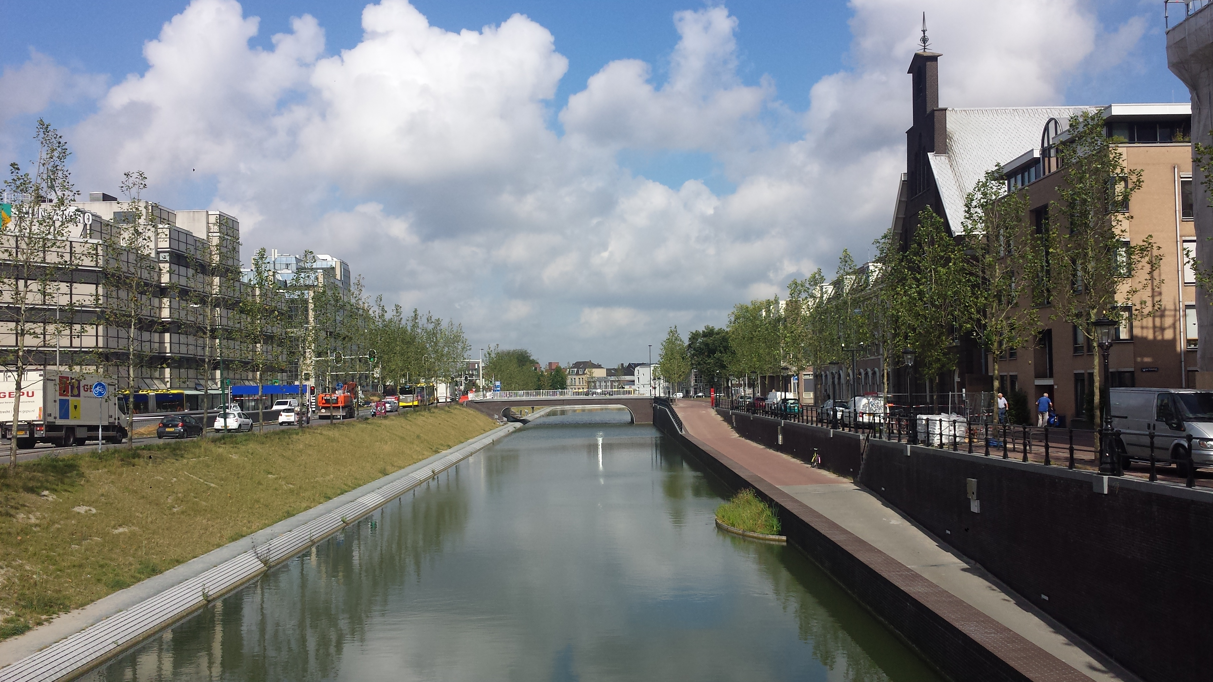 Daalsesingel - vanaf wat op termijn de Vredenburgknoop wordt. Verderop is de Paardenveldbrug te zien